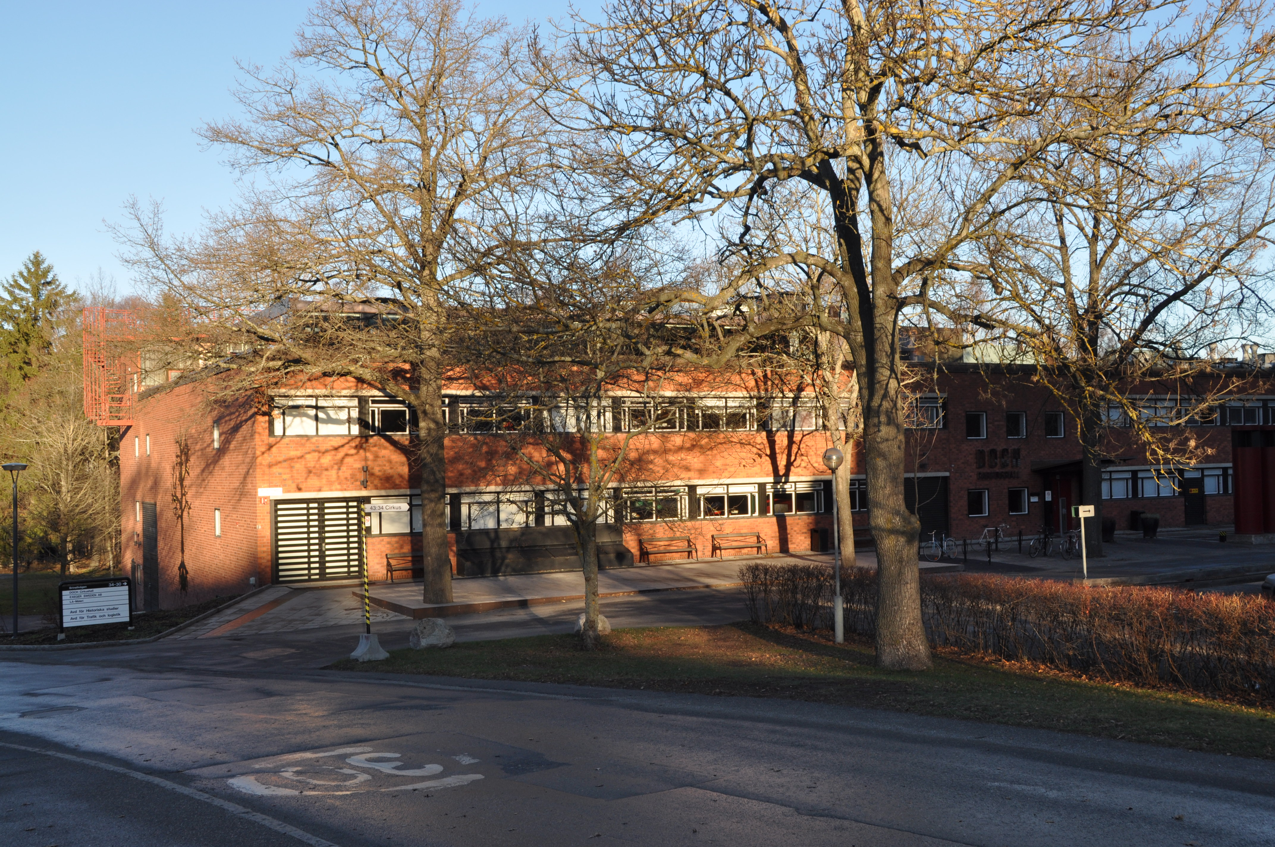 Cirkushall, KTH. Brinellvägen 30-36, Stockholm Ursprungligen lab. Byggår: 1972, Arkitekt Gunnar Henriksson Ombyggt 2010